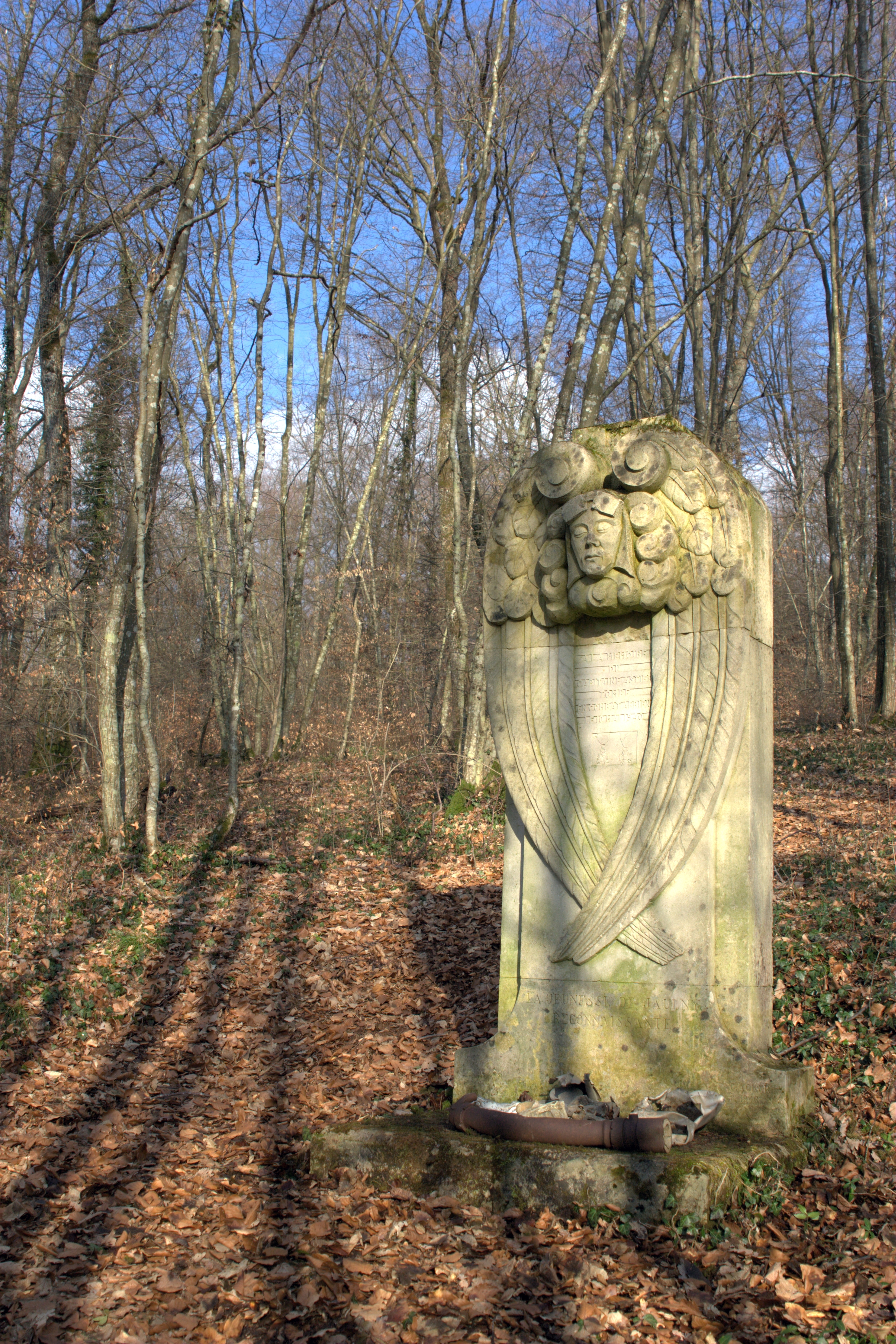 Stèle en hommage au capitaine Astier dans les bois proches de Jaulny